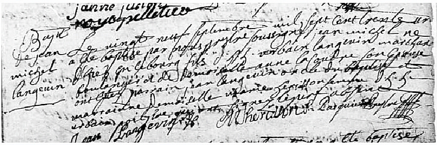 Jean-Michel Langevin - acte de baptême du 29 septembre 1731.